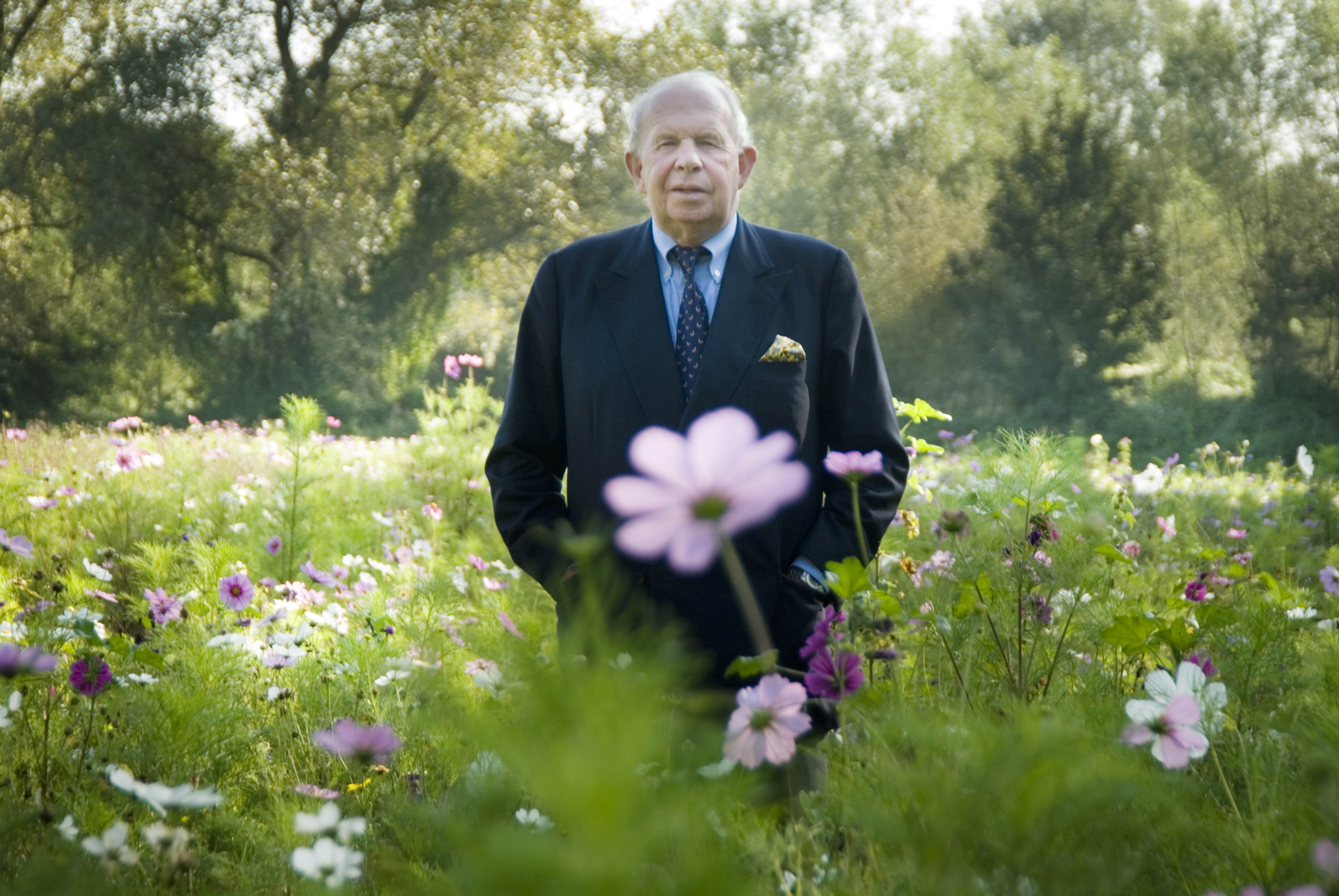 Leopold Lippens, burgemeester Knokke